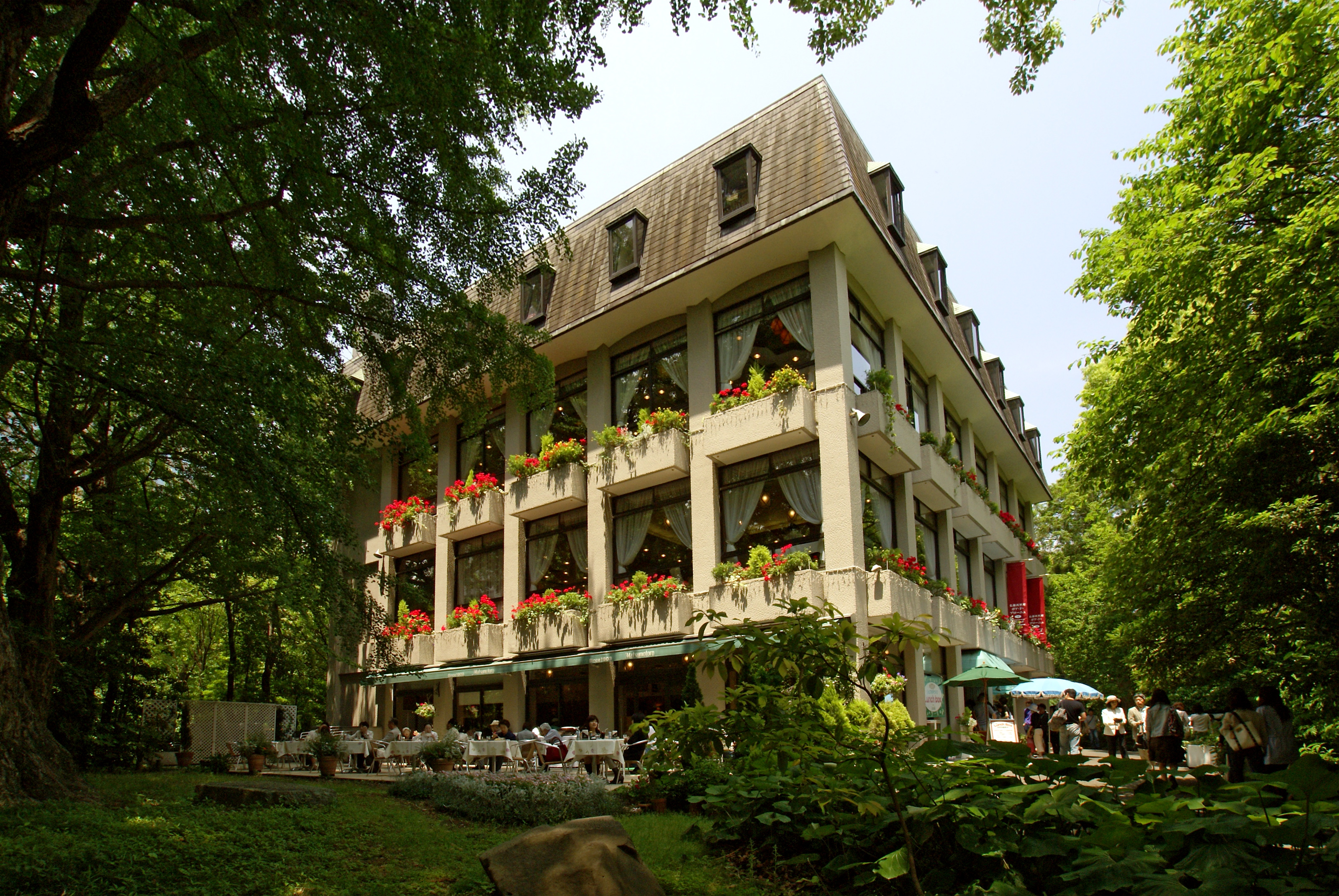 Hibiya Park in Chiyoda-ku, Tokyo, Japan